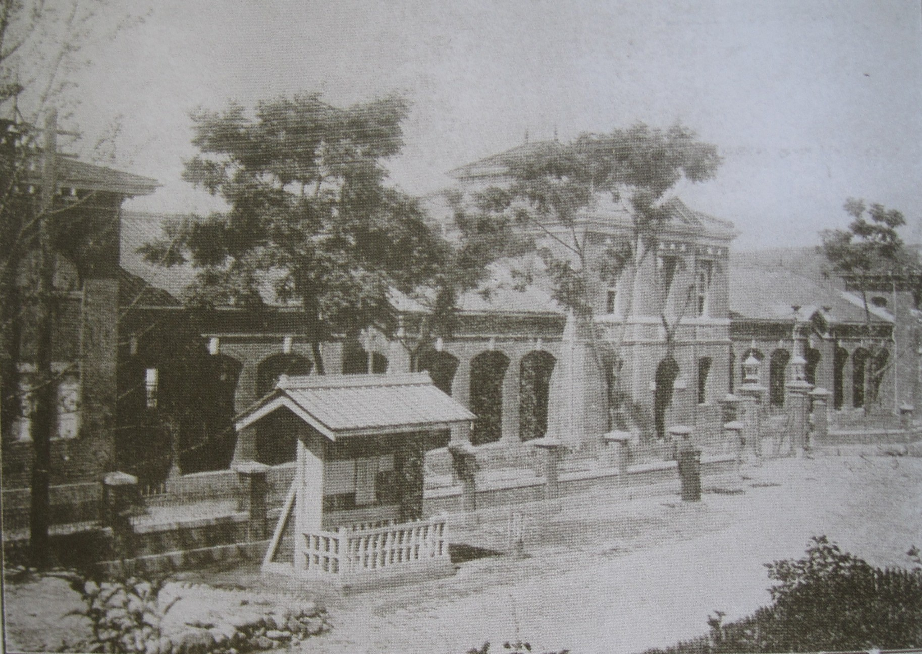 日治時期南投廳舍